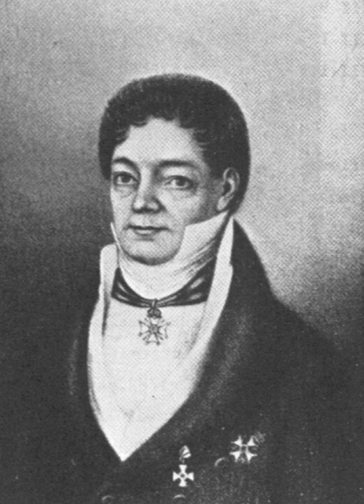 Bild von Friedrich von Bernuth (†1832)